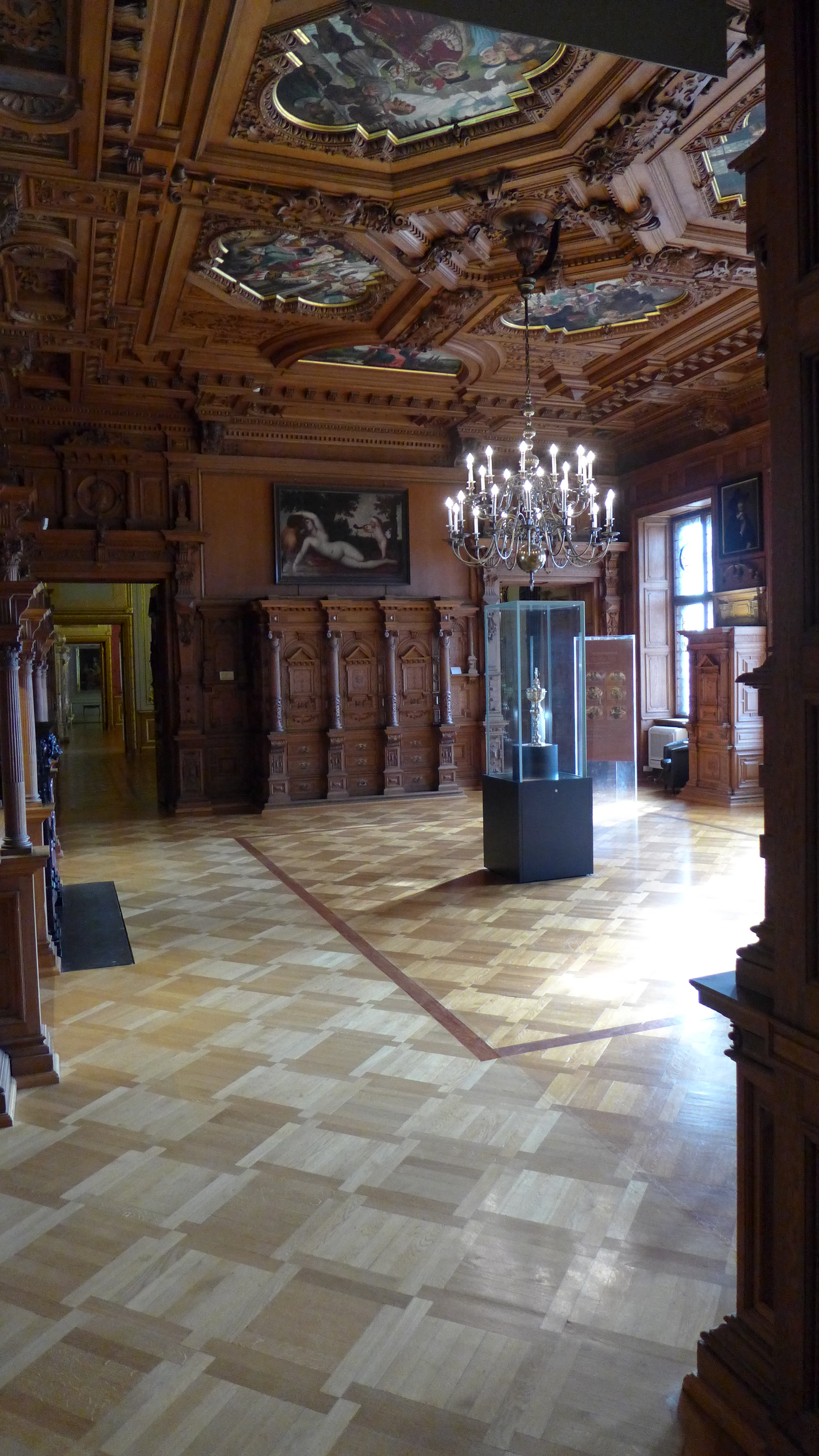 Schloss Philippsruhe, Saal mit überreicher Ausstattung im Stil der Neorenaissance